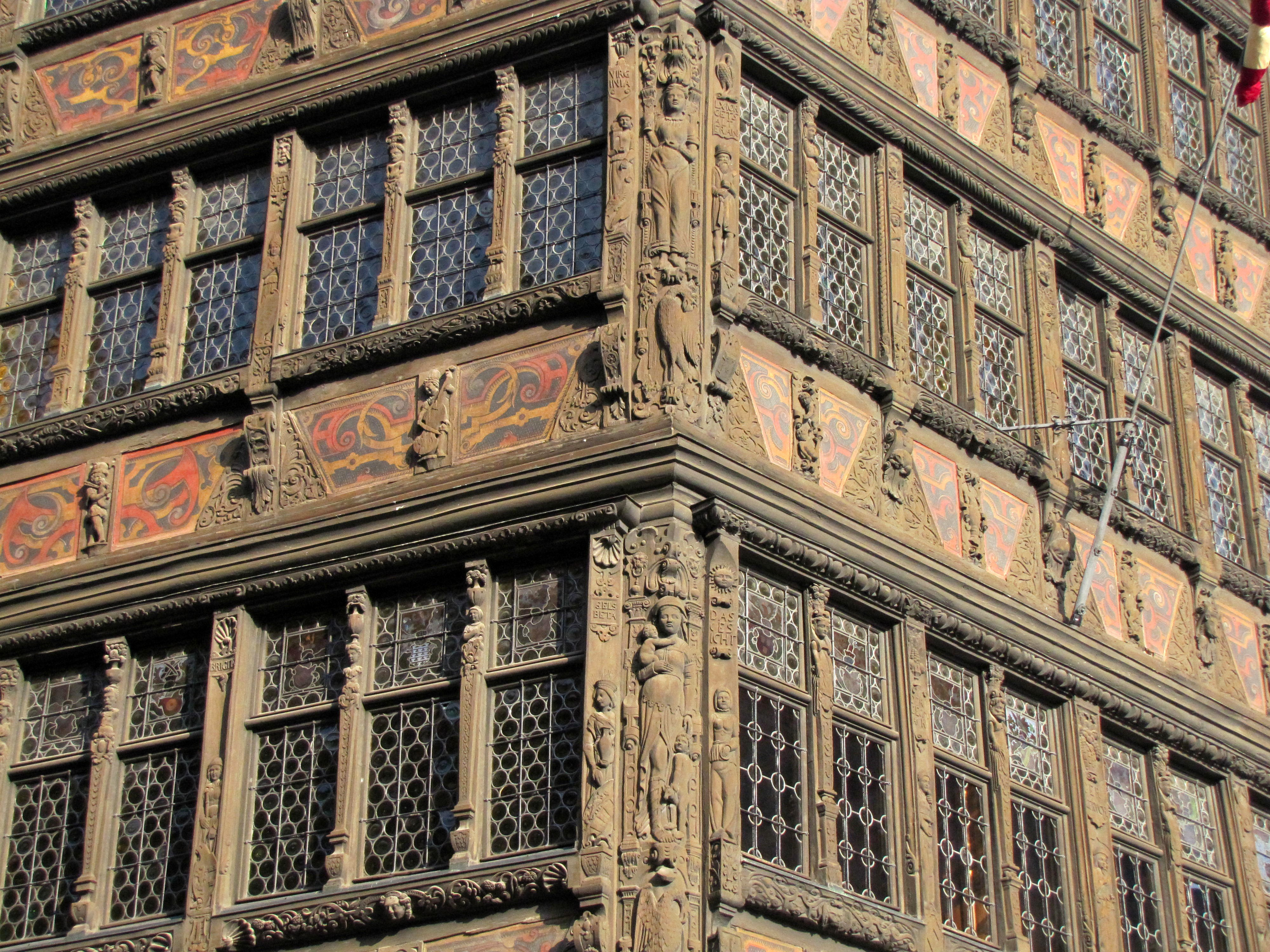 Alsace, Bas-Rhin, Strasbourg, Maison Kammerzell (XVe-XVIe), 16 place de la Cathédrale. .